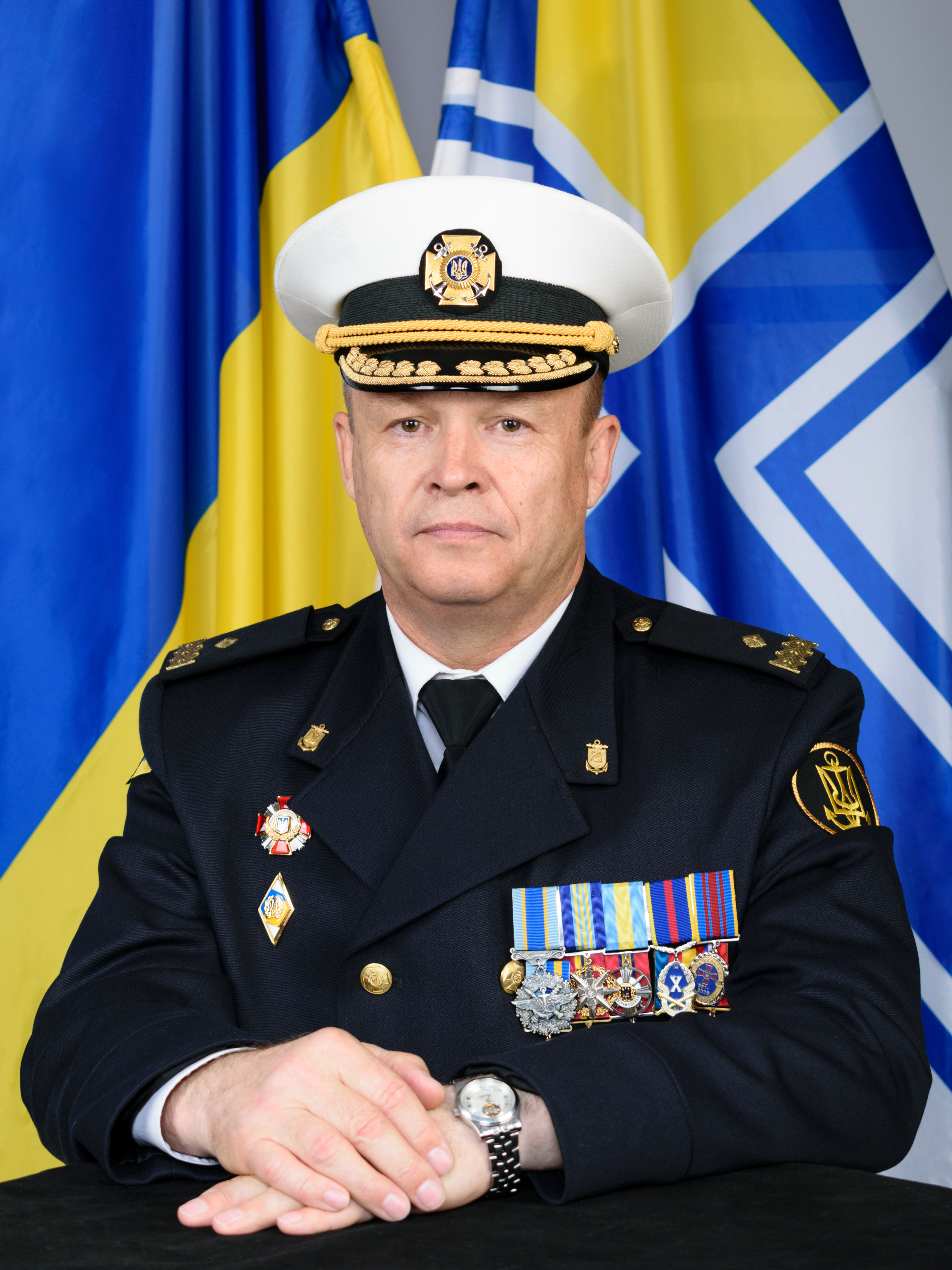 Генерал-майор Черненко Василь Іванович